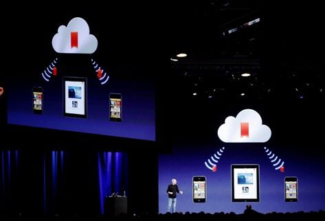 Steve Jobs